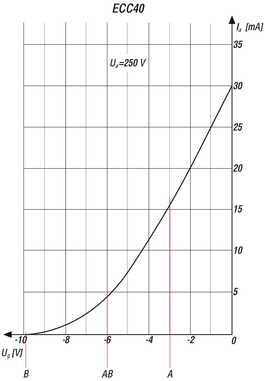 Ug-Ia Kennlinie einer Röhre ECC40 mit Arbeitspunkten; Anodenstrom Ia als Funktion der Gitterspannung Ug